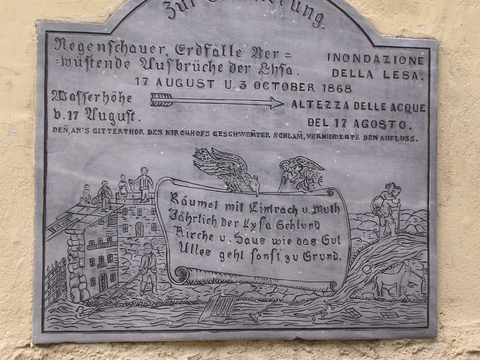 Targa in memoria dell'inondazione della Lesa il 17 agosto 1868